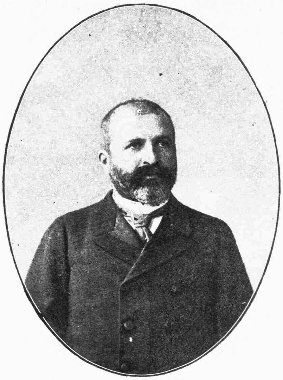 griechischer Politiker, 19. Jahrhundert